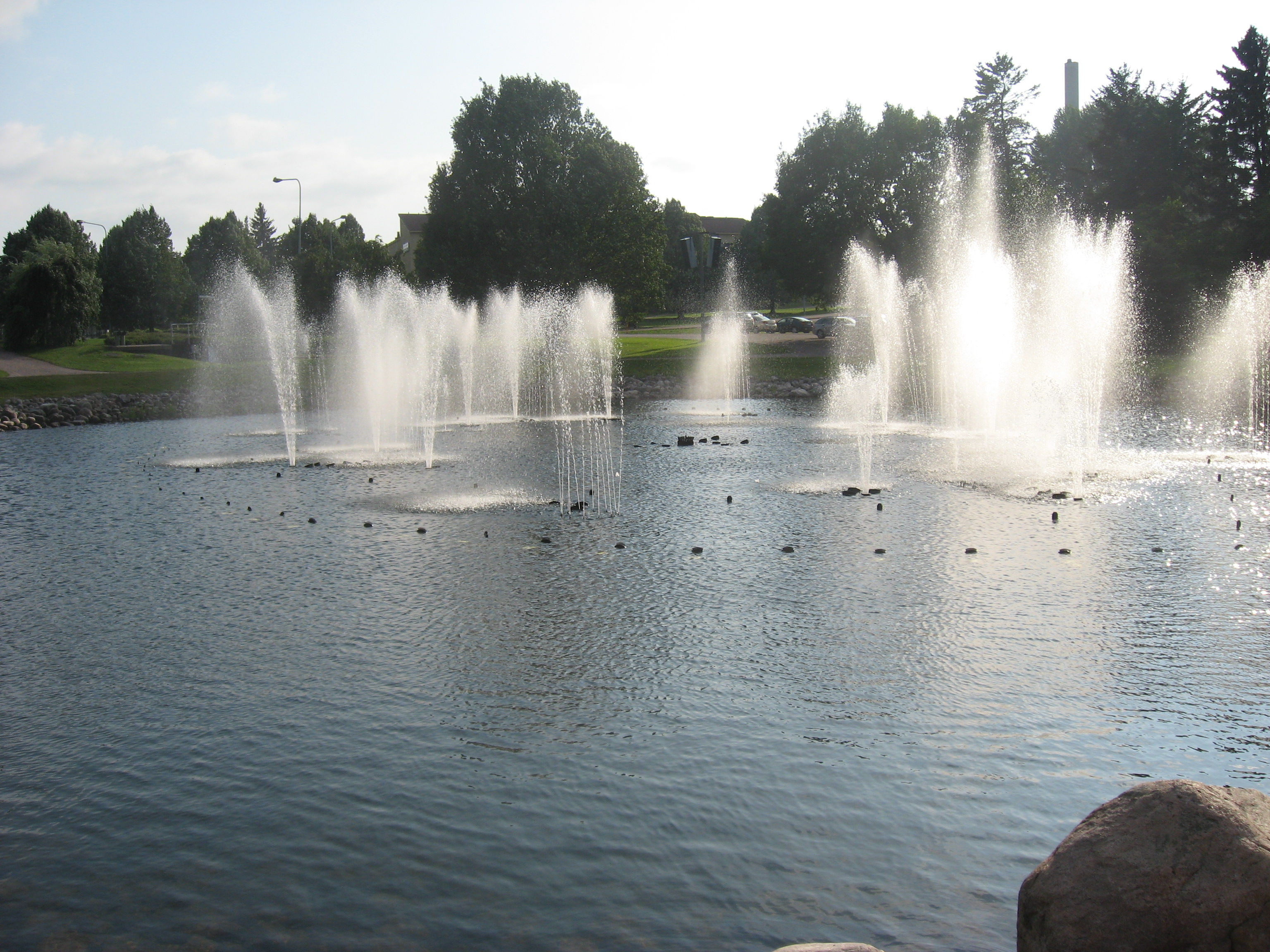 Vesiurut